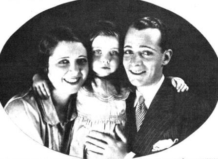 Los actores españoles Carlos Díaz de Mendoza y Guerrero y Rosario Larrabeiti con su hija la también actriz Mari Carmen Díaz de Mendoza